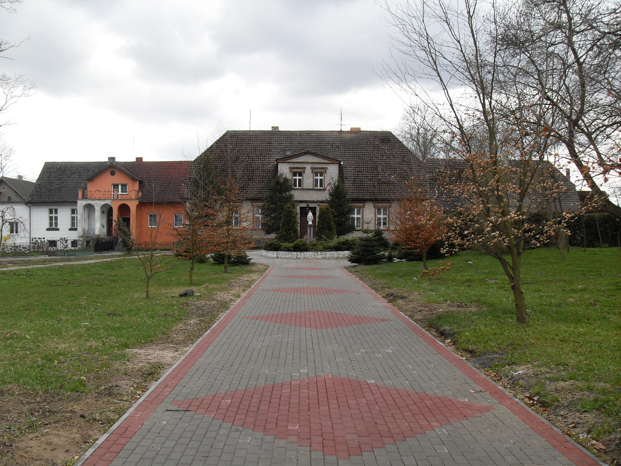 Ehem. Gutshaus